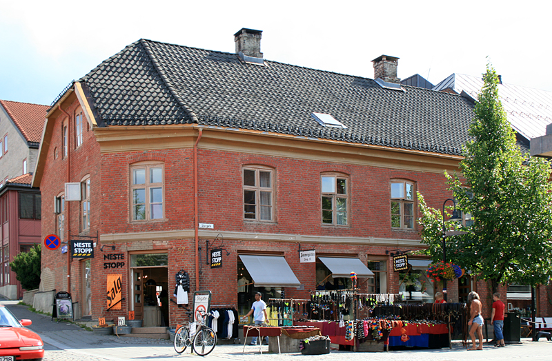 Bøhmergården, Lillehammer.